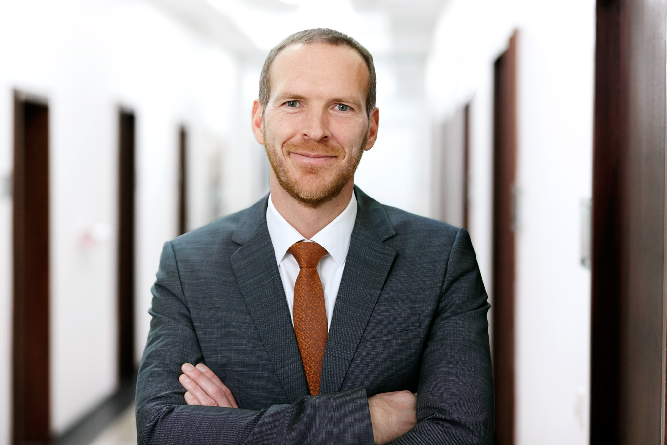 Dr. Jan Heinisch